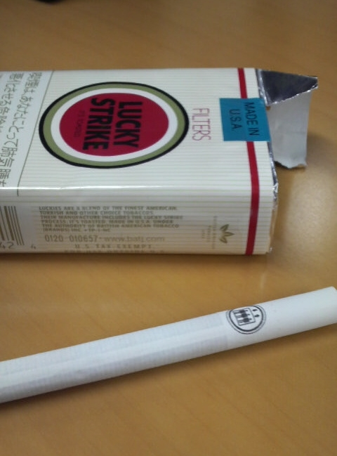 Lucky Strike White Filter